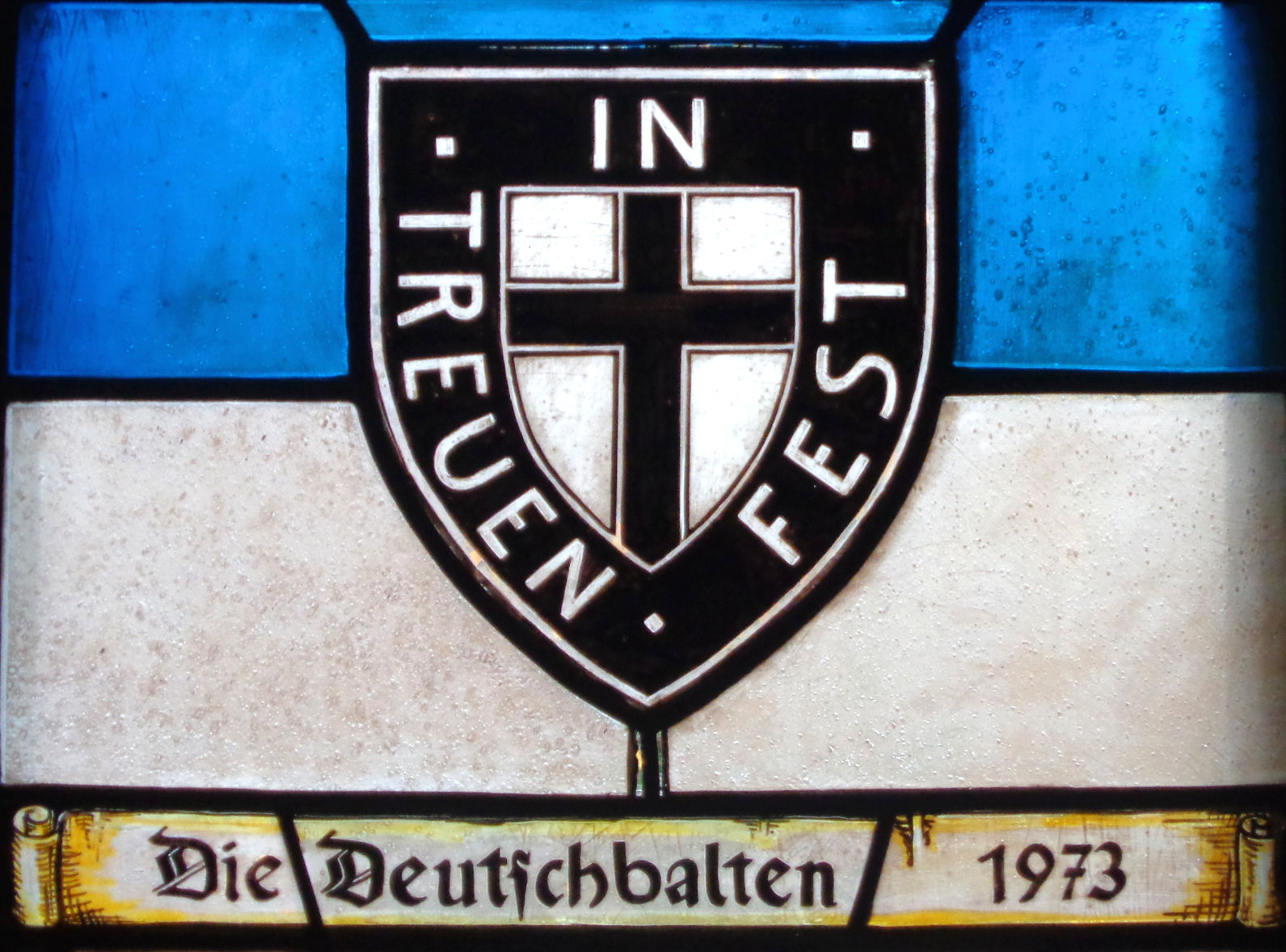 Glasfenster mit Flagge und Wappen der Deutschbalten im Lüneburger Brömsehaus